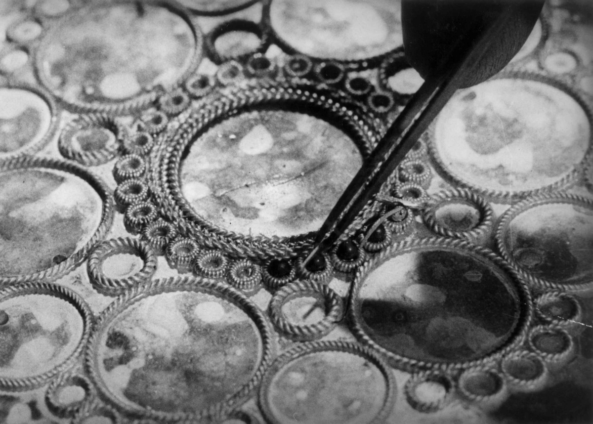 Sølvsmeden Knut Helle, Valle i Setesdal arbeider med å montere deler på en bolesølje. Fotografert i 1959 av Kyrre Grepp / Norsk Folkemuseum.